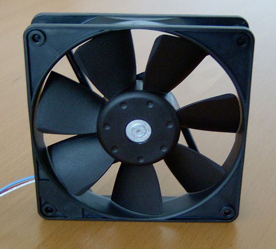 DC-Axiallüfter der Firma ebmpapst mit einer Kantenlänge von 119 mm, selber fotografiertr